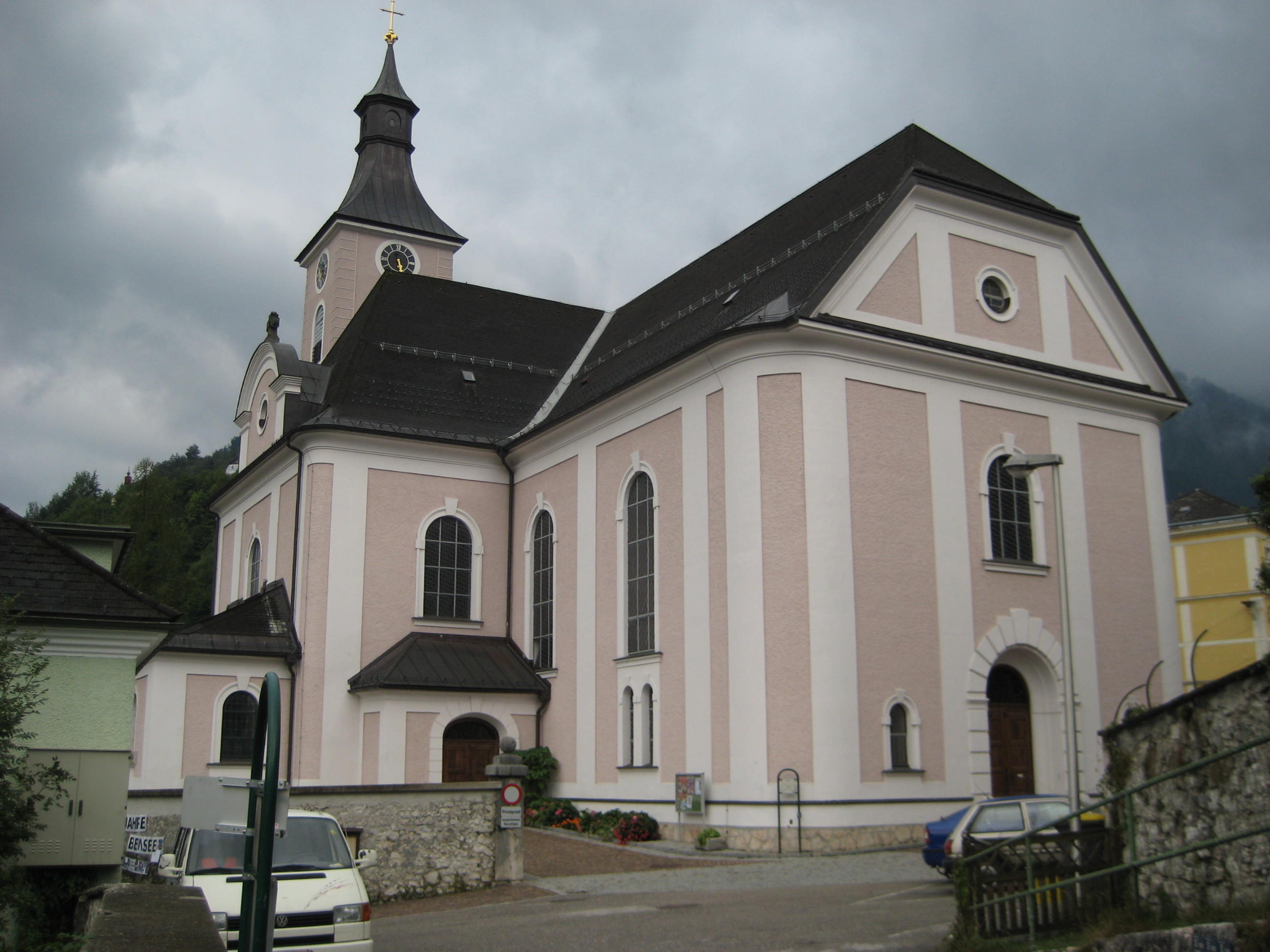 Katholische barocke Pfarrkirche in Ebensee